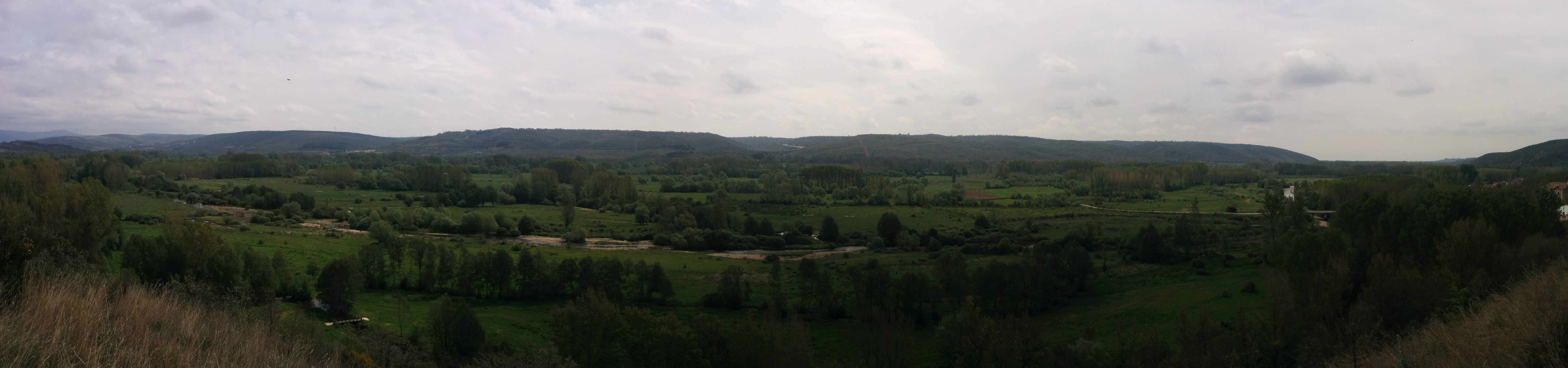 Valle del río Luna desde la torre de Ordás (Santa María de Ordás, León).